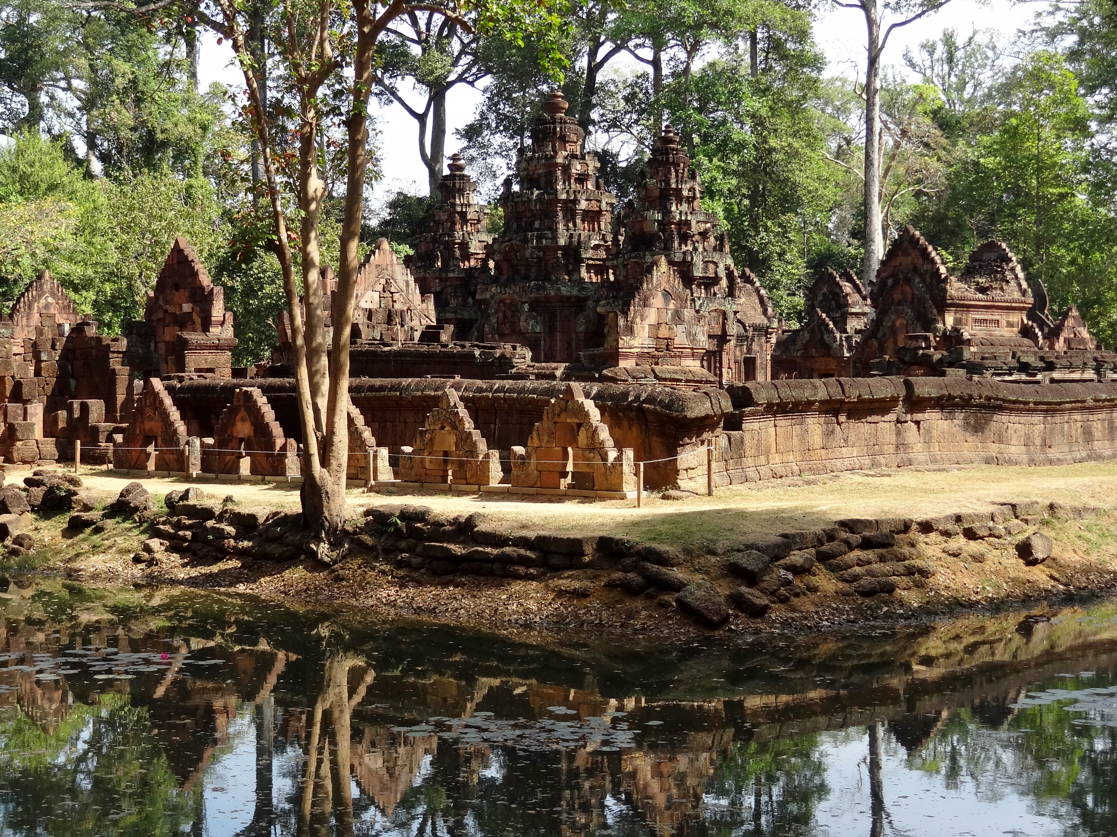 Banteay Srei (ប្រាសាទបន្ទាយស្រី ‚Zitadelle der Frauen‘), ursprünglich Tribhuvanamahesvara (‚Großer Gott der dreifaltigen Welt‘), Provinz Siem Reap, Kambodscha